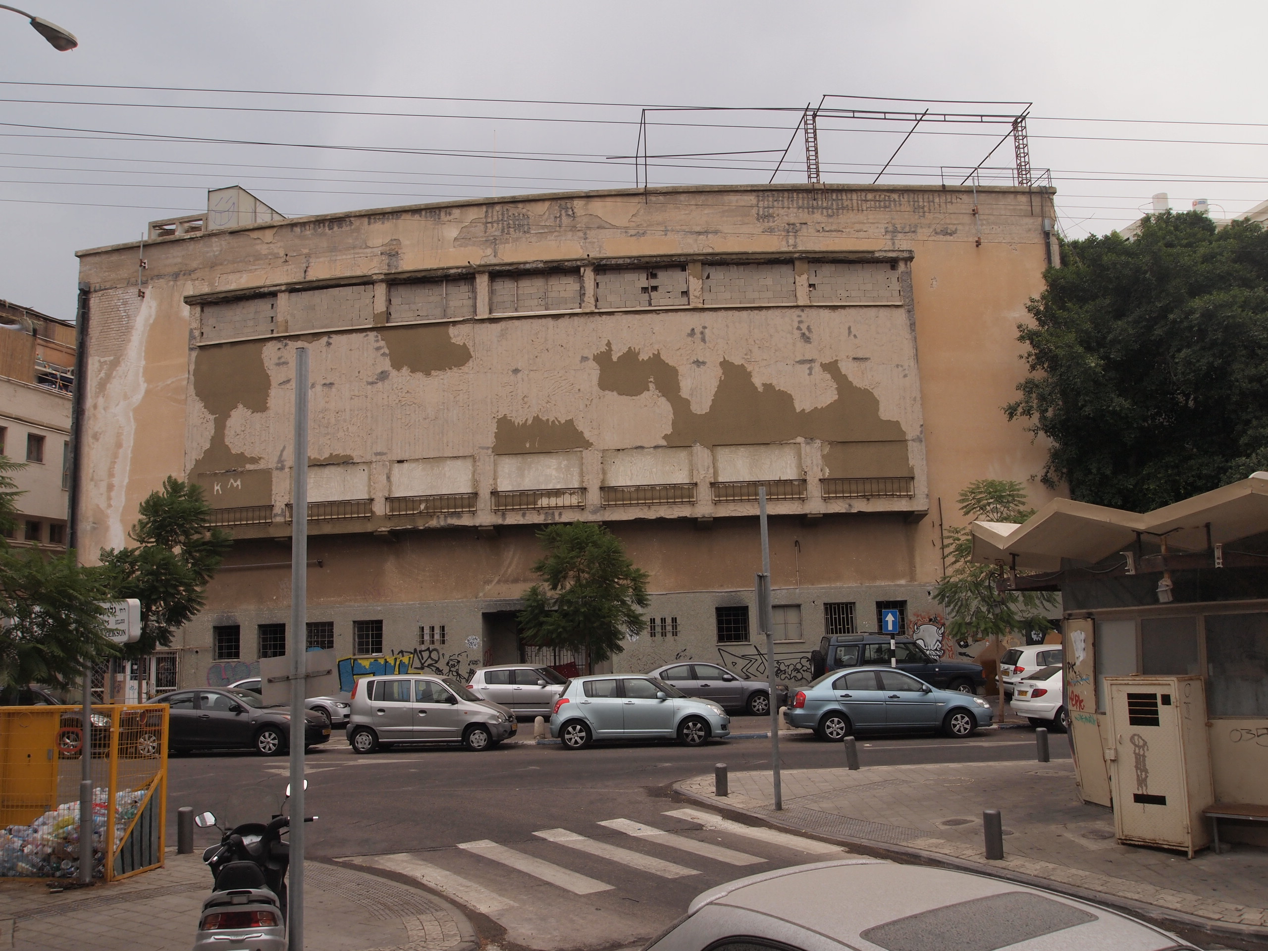 בית תיאטרון אהל ברח' בילינסון בתל אביב